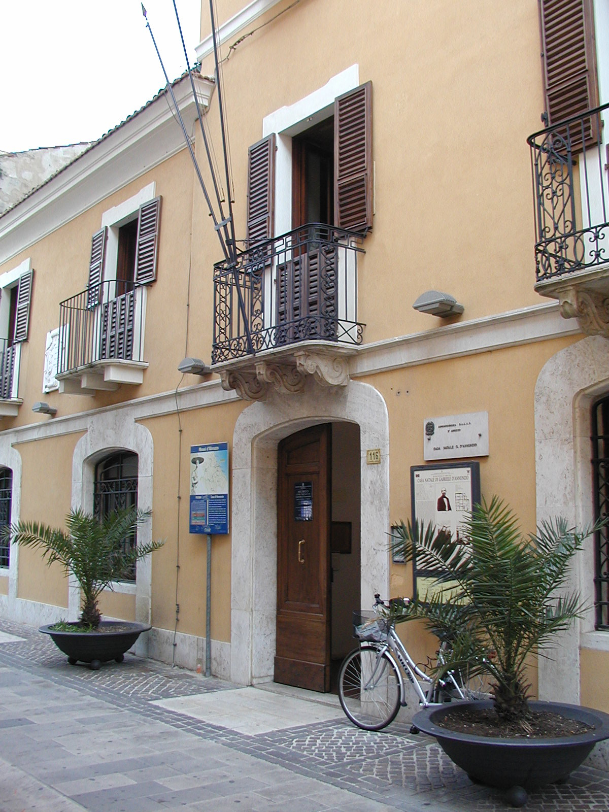 Das Geburtshaus in Pescara